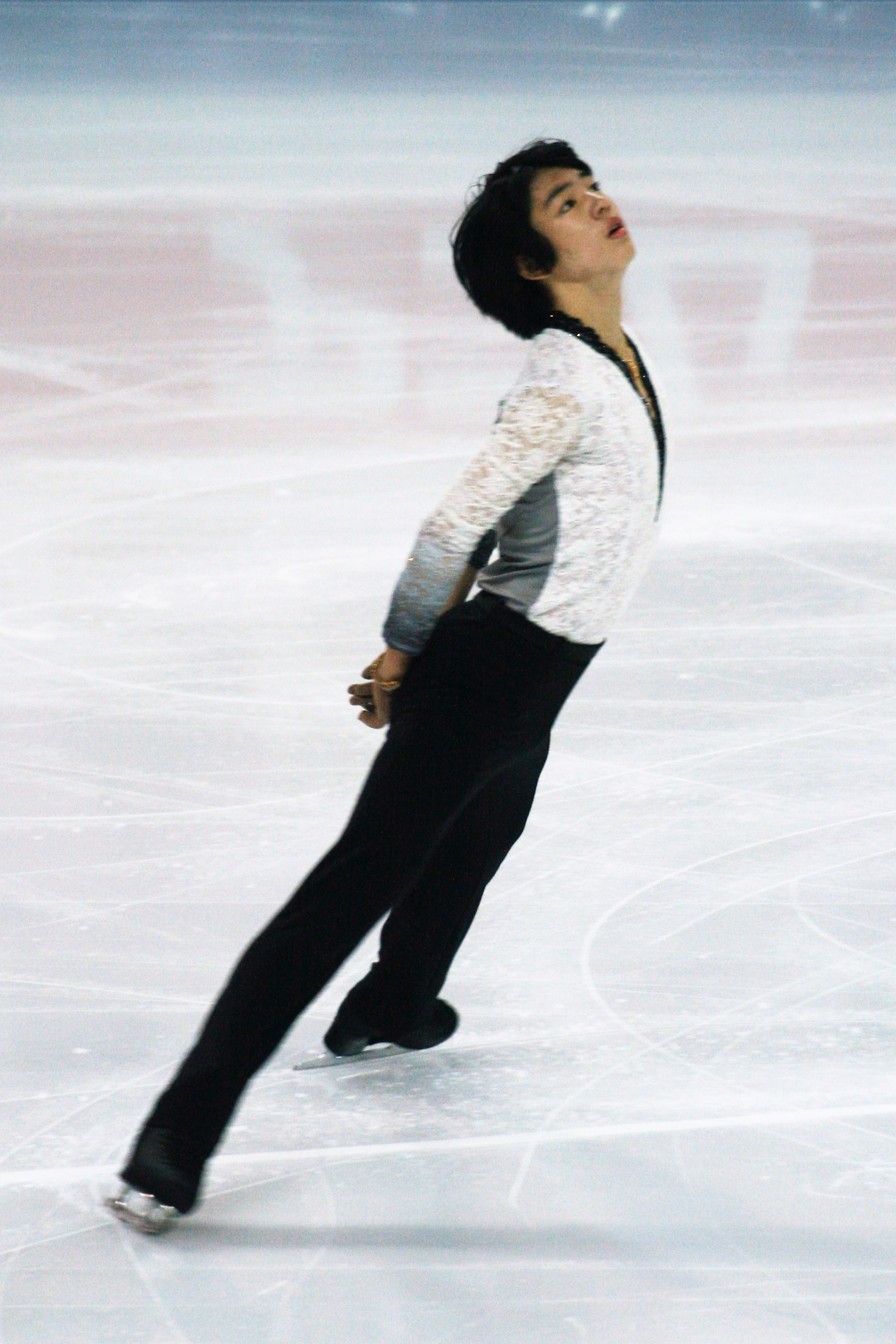 Ча Чжун Хван (Республика Корея) на финале Гран-при по фигурному катанию среди юниоров 2016-2017